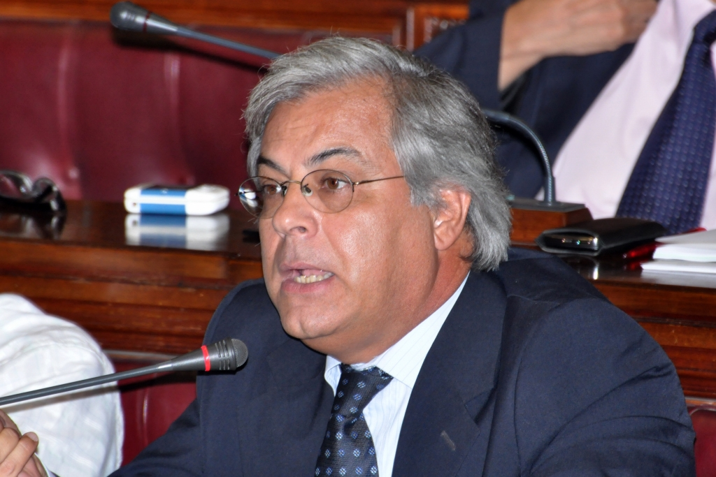 El Diputado Gonzalo Mujica interviniendo en Cámara de Representantes.